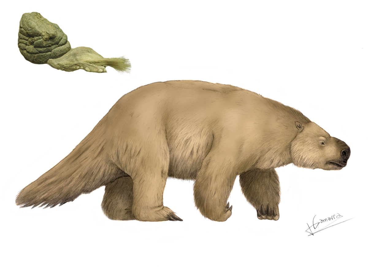 Reconstrucción del Mylodon darwini